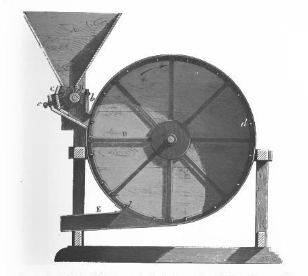 Tarare brise insectes, machine agricole destinée à tuer les larves d'insectes vivant dans les grains de blé (XIXe siècle)